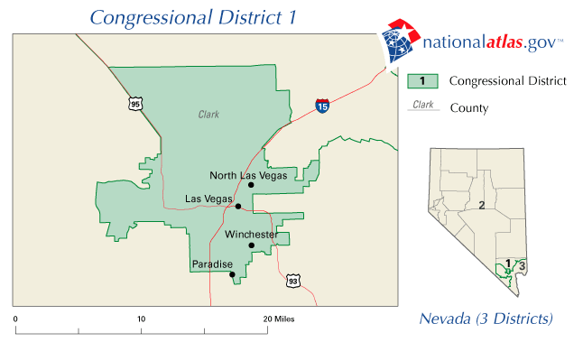 Nevada's 1st congressional district